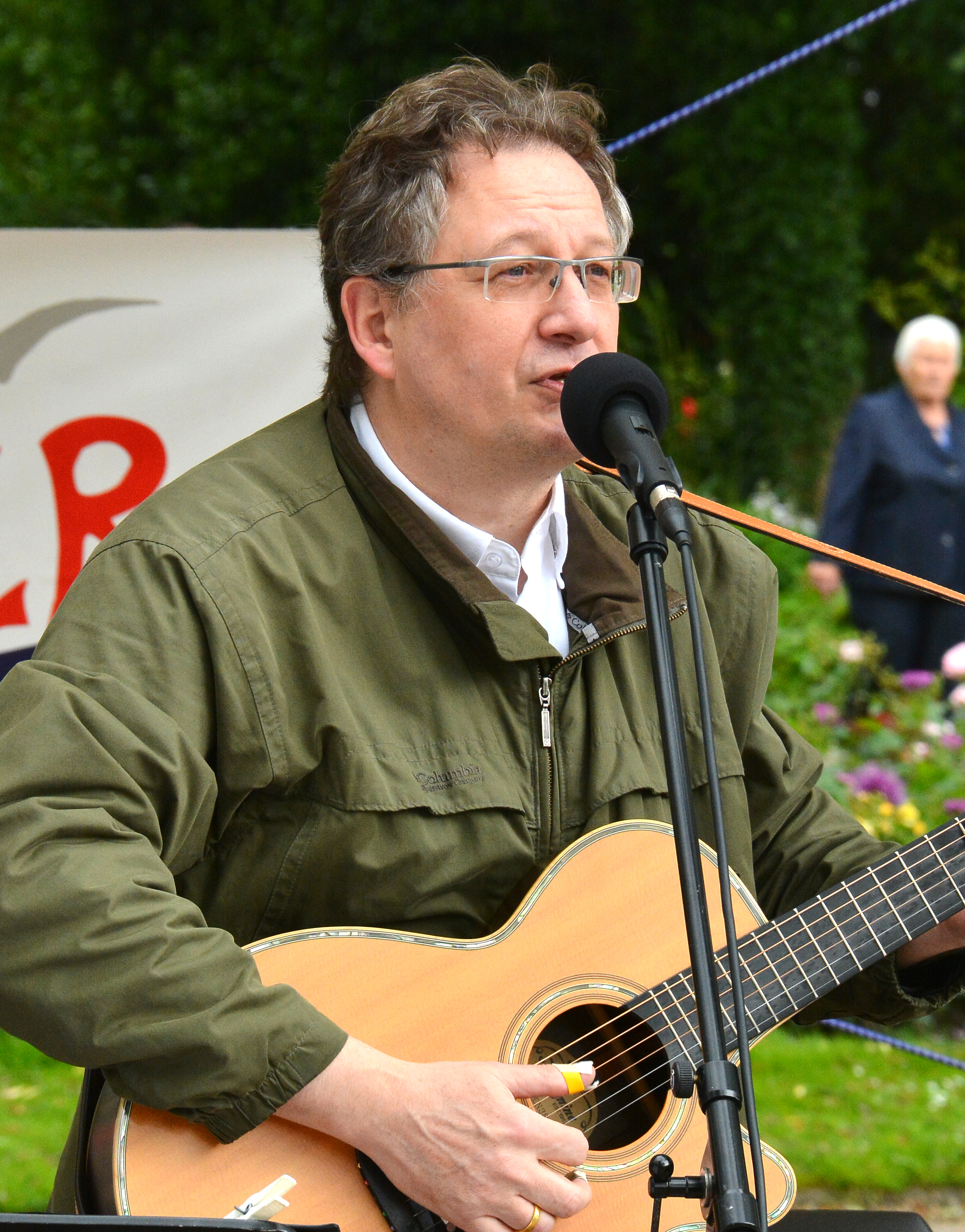 Bert C. Biehl ( Waldzither, Bass und Gesang) von den Liekedeler im Rosenpavillon zur Eröffnung der Rosensaison im Rosarium Uetersen 2014